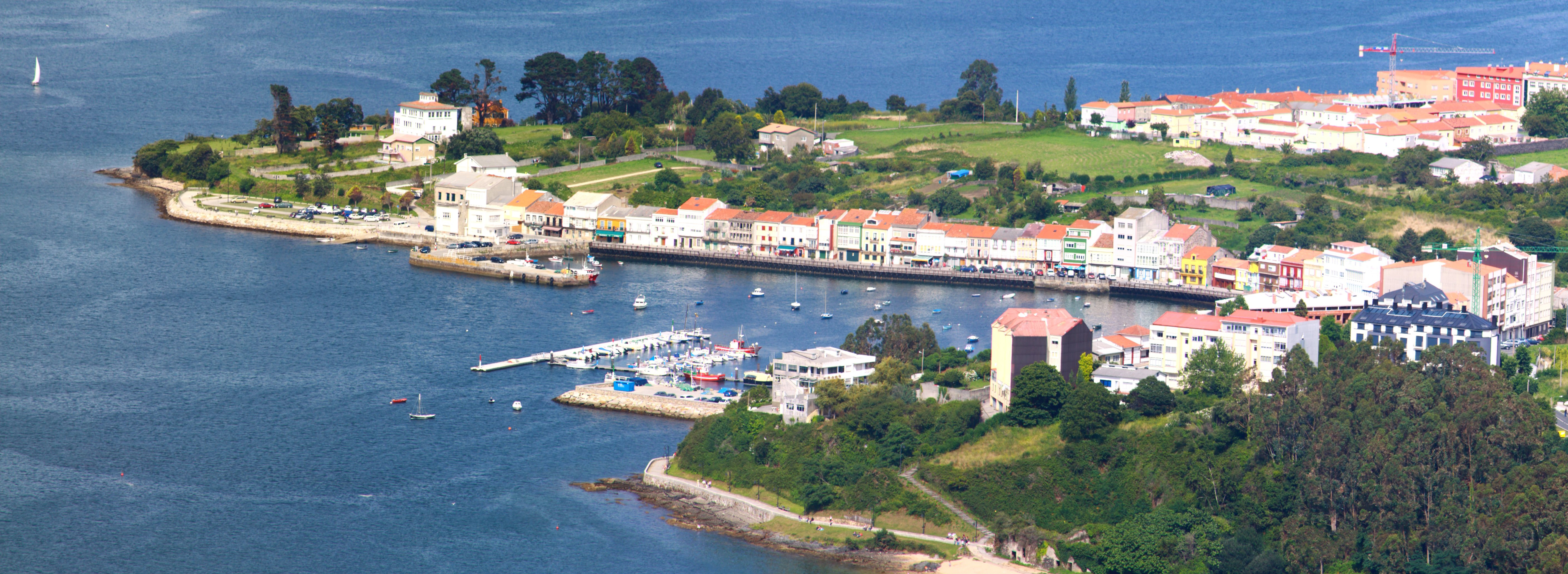 Mugardos, Galiza